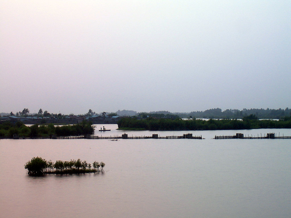 Ouidah, Beninafrika 626